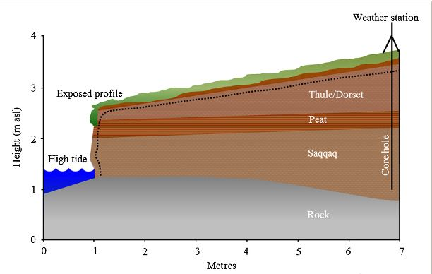 Site archéologique de Qajaa.